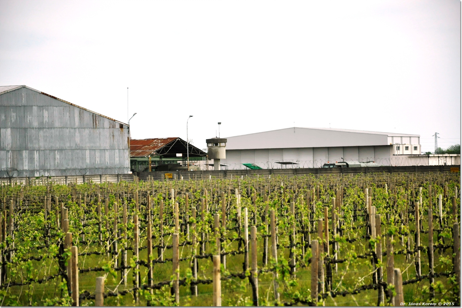 Militärflugplatz Casarsa della Delizia “Francesco Baracca”